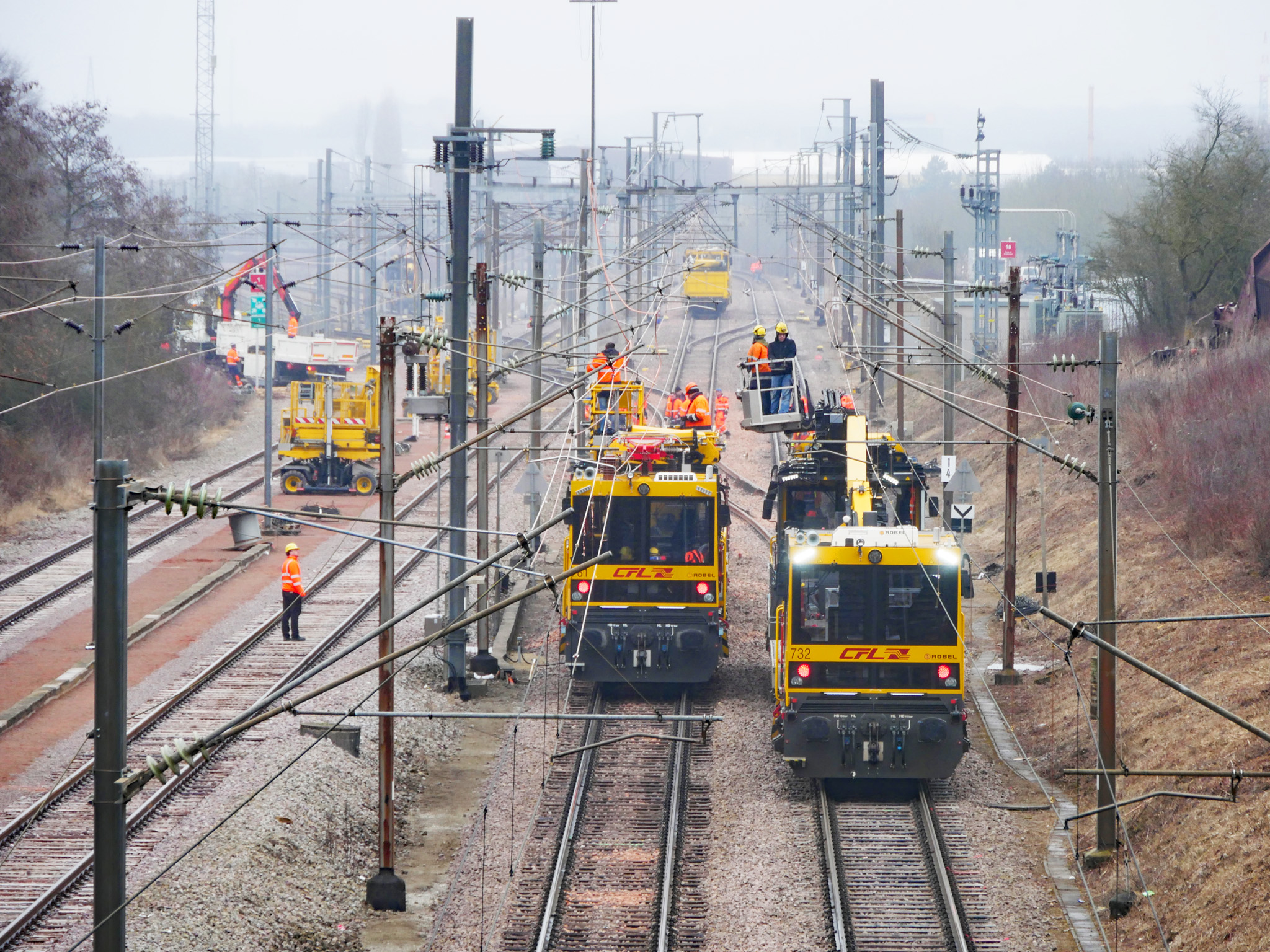 Travaux de remise en état de la ligne 6 au niveau du PK 1,4, six jours après la catastrophe de Dudelange